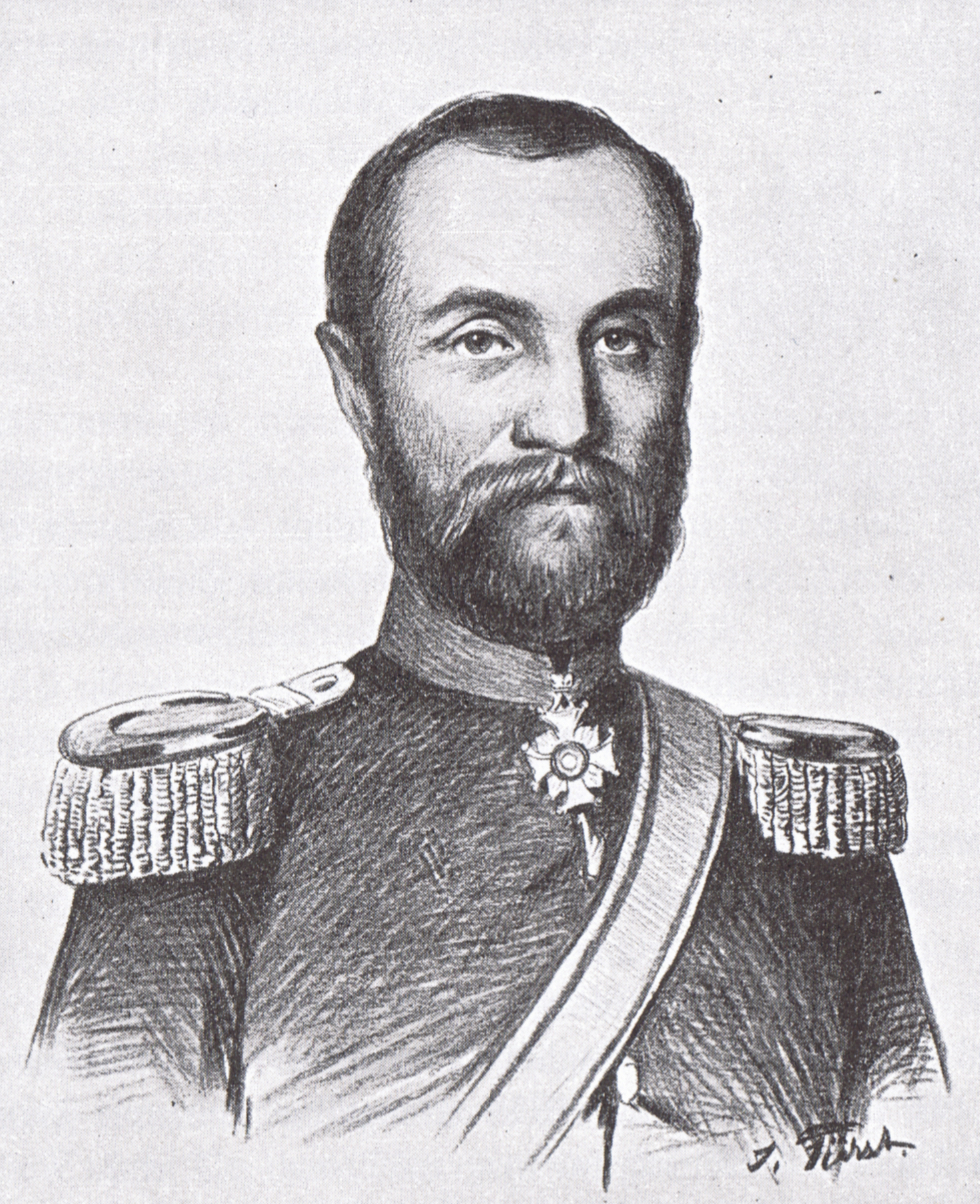 Eduart Julius Jungmann preußischer Offizier im Schleswig-Holsteinischem Krieg, Zeichnung von Julius Fürst um 1895.